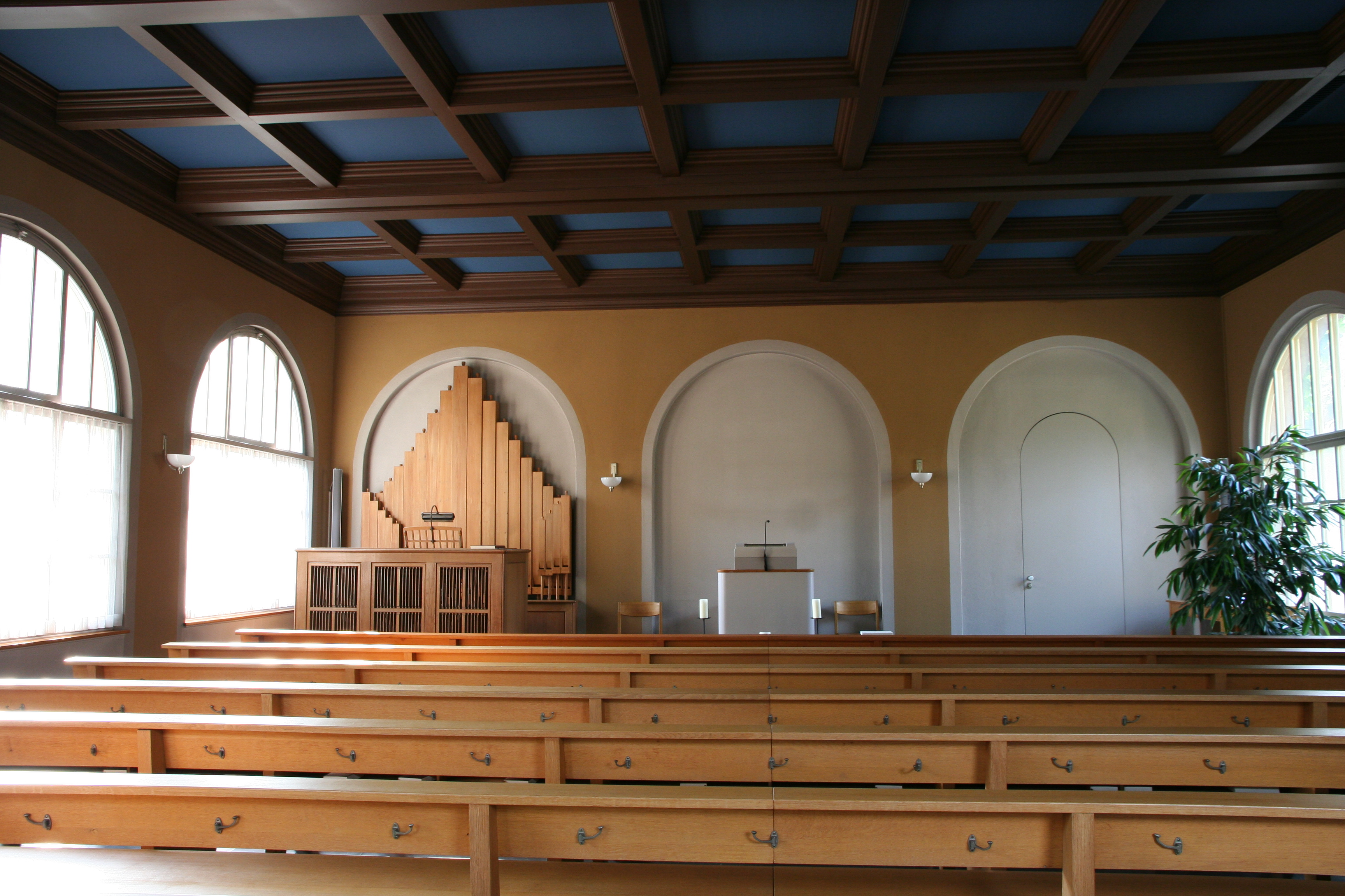 Friedhof Sihlfeld Abdankungshalle D